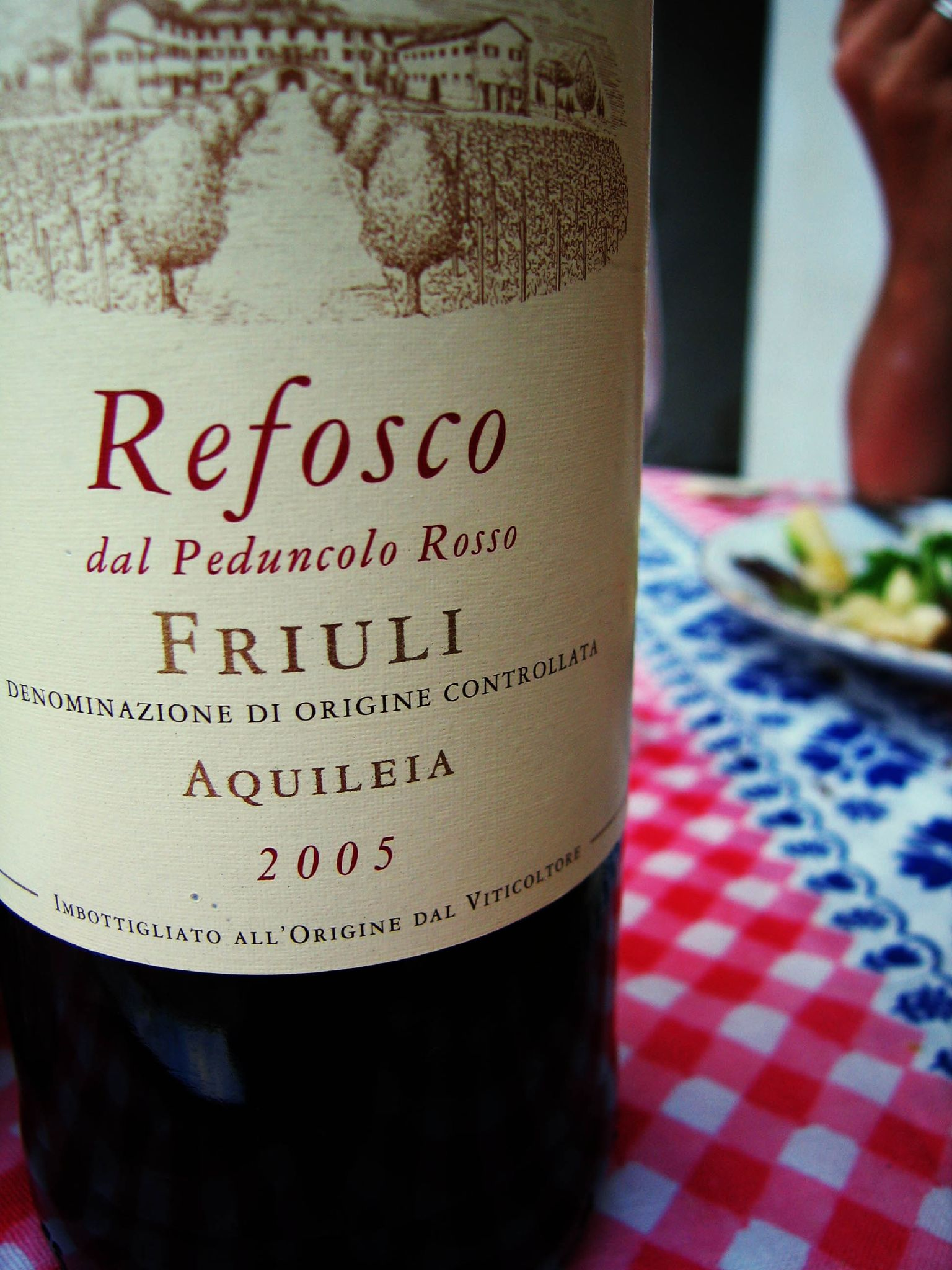 Van de wijn die we dronken was deze mijn favoriet, net als vorig jaar . Een rode wijn met vrij sterke smaak, dus niet geschikt voor elk gericht of moment.